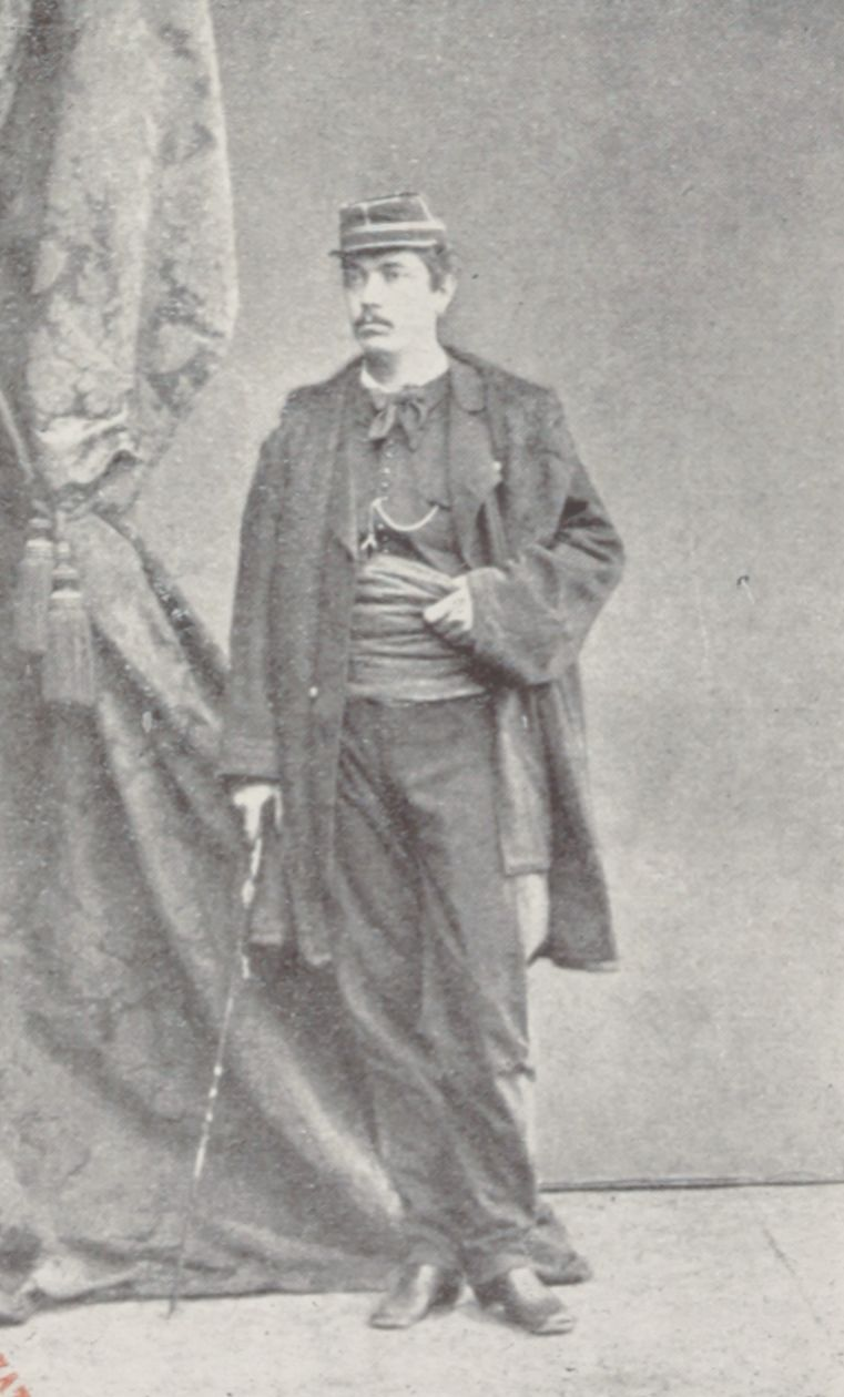 "Charles Risler. Lieutenant à la 1ère batterie d'artillerie de la Mobile, à Neuf-Brisach".